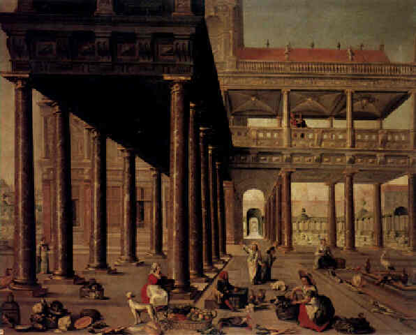 Matías Ximeno, Cristo expulsando a los mercaderes del templo, Óleo sobre tela (132x163 cm.) Venta en Sotheby’s de Londres, 1998